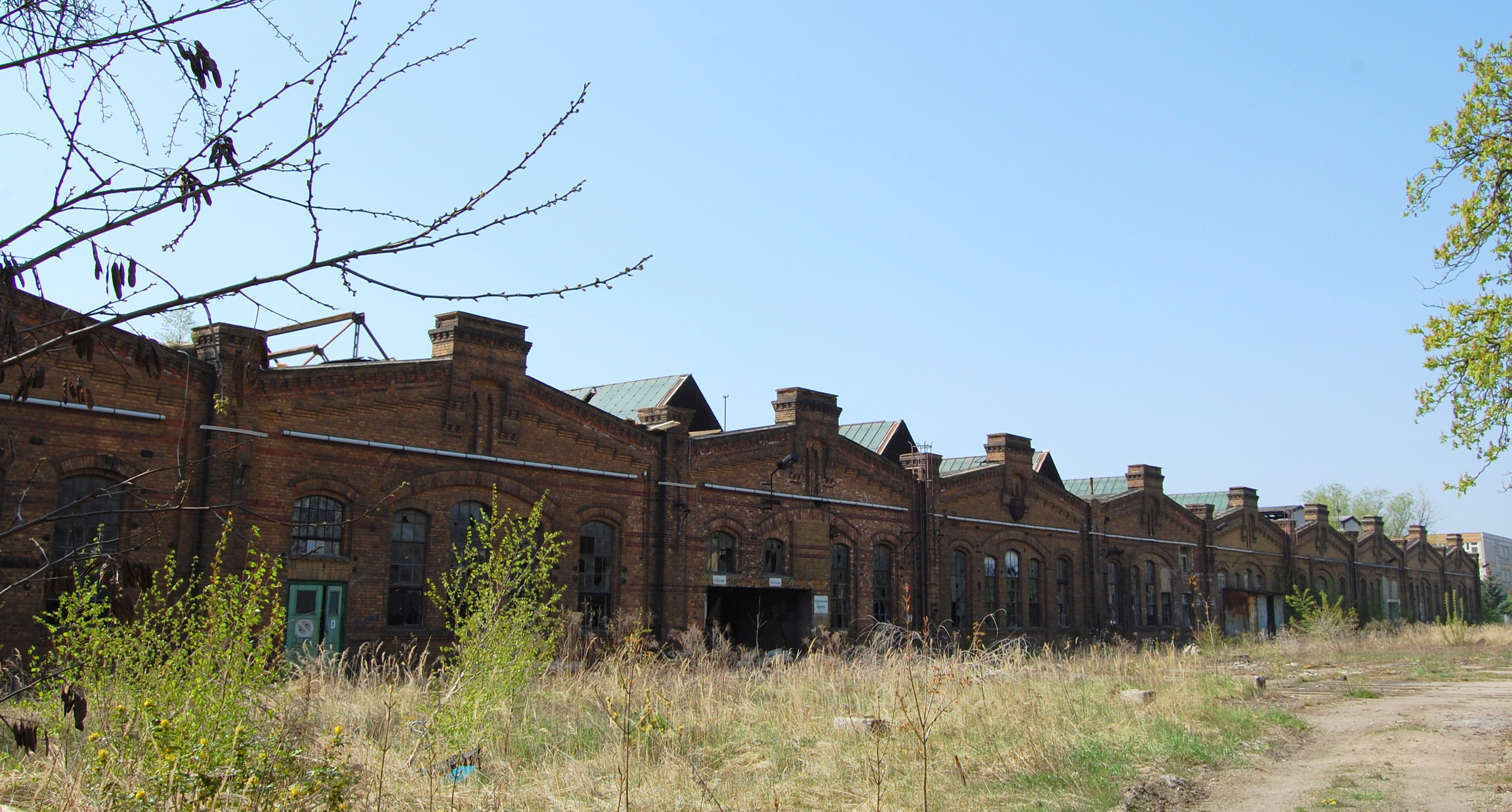 RAW Salbke Wagenreparaturwerkstatt, Ostseite